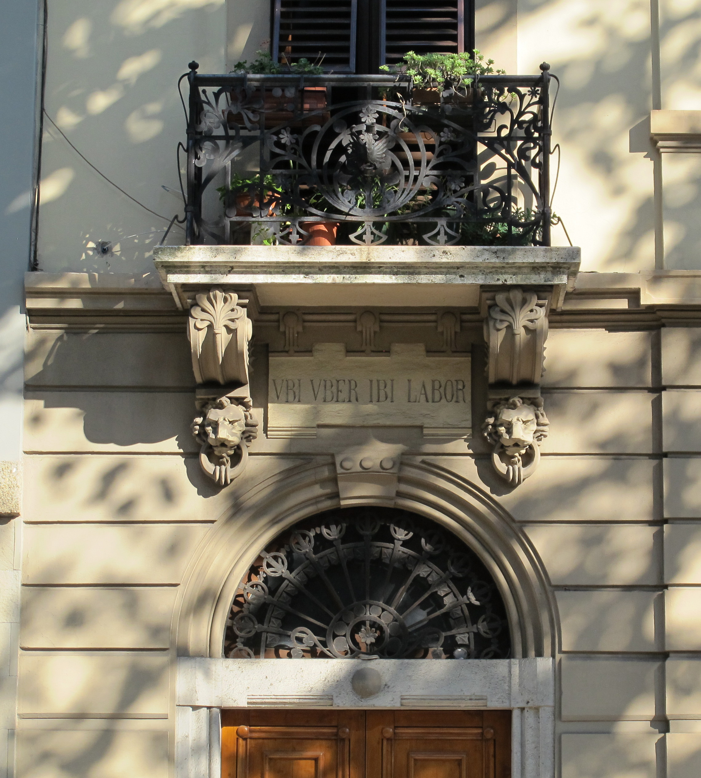 Viale Giuseppe Mazzini e dintorni, Firenze